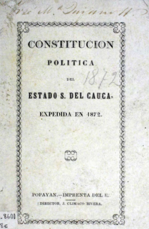 Constitución Política del Estado Soberano del Cauca, Estados Unidos de Colombia, 1872